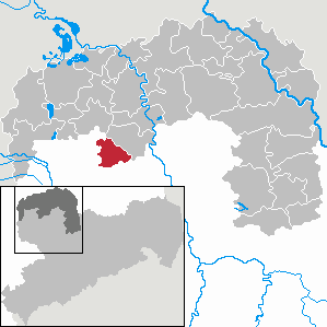 Taucha in Saxony - Landkreis Nordsachsen